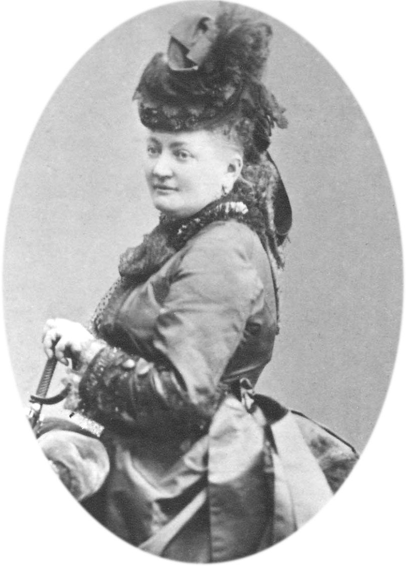 Marie Charlotte Blanc (born Hensel)